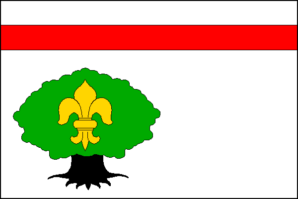 vlajka, Staré Buky , okres Trutnov